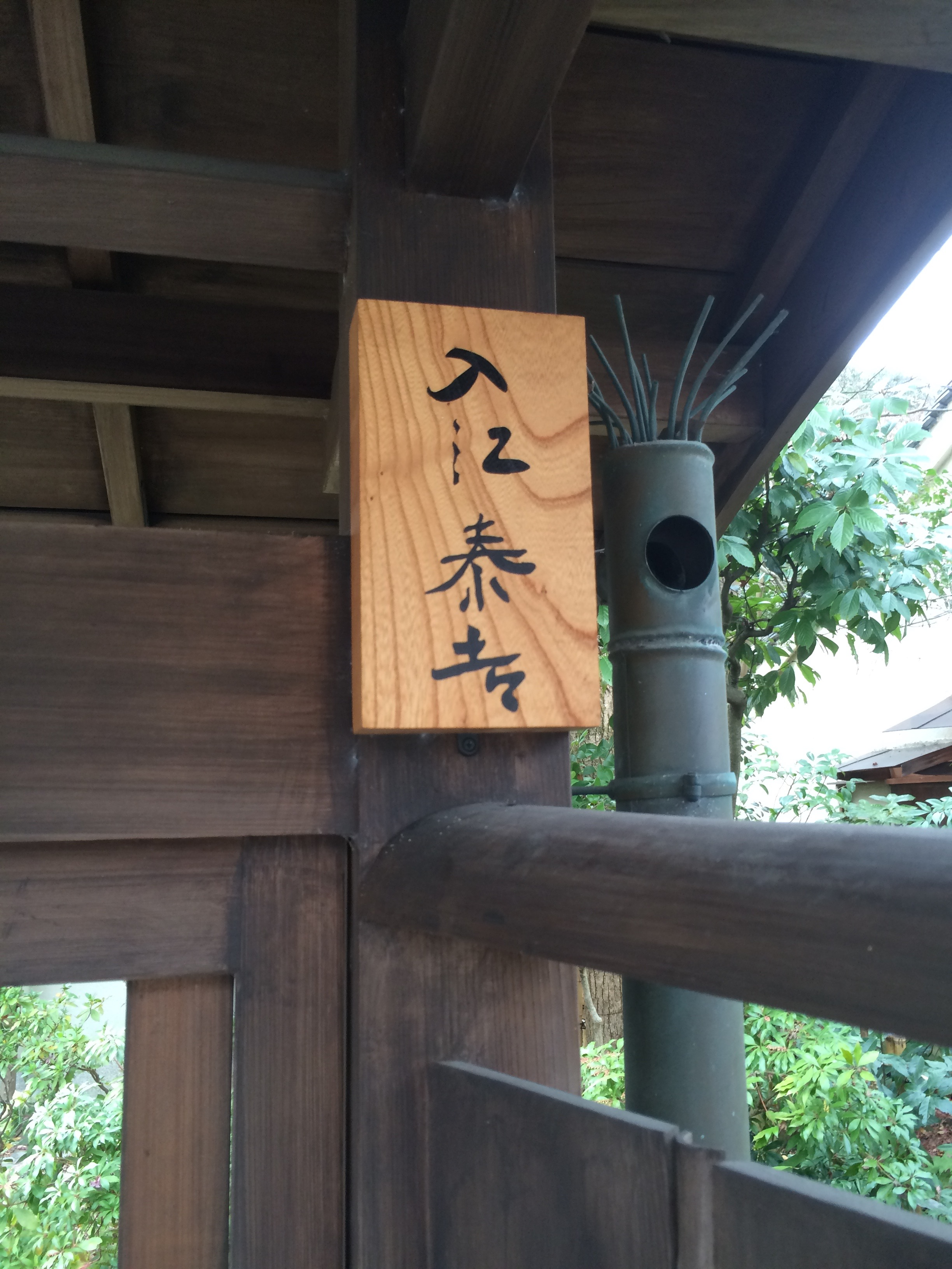 入江泰吉旧居表札。上司海雲の揮毫。